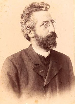 Goldziher Ignác orientalista, egyetemi tanár, a Magyar Tudományos Akadémia tagja. 1892